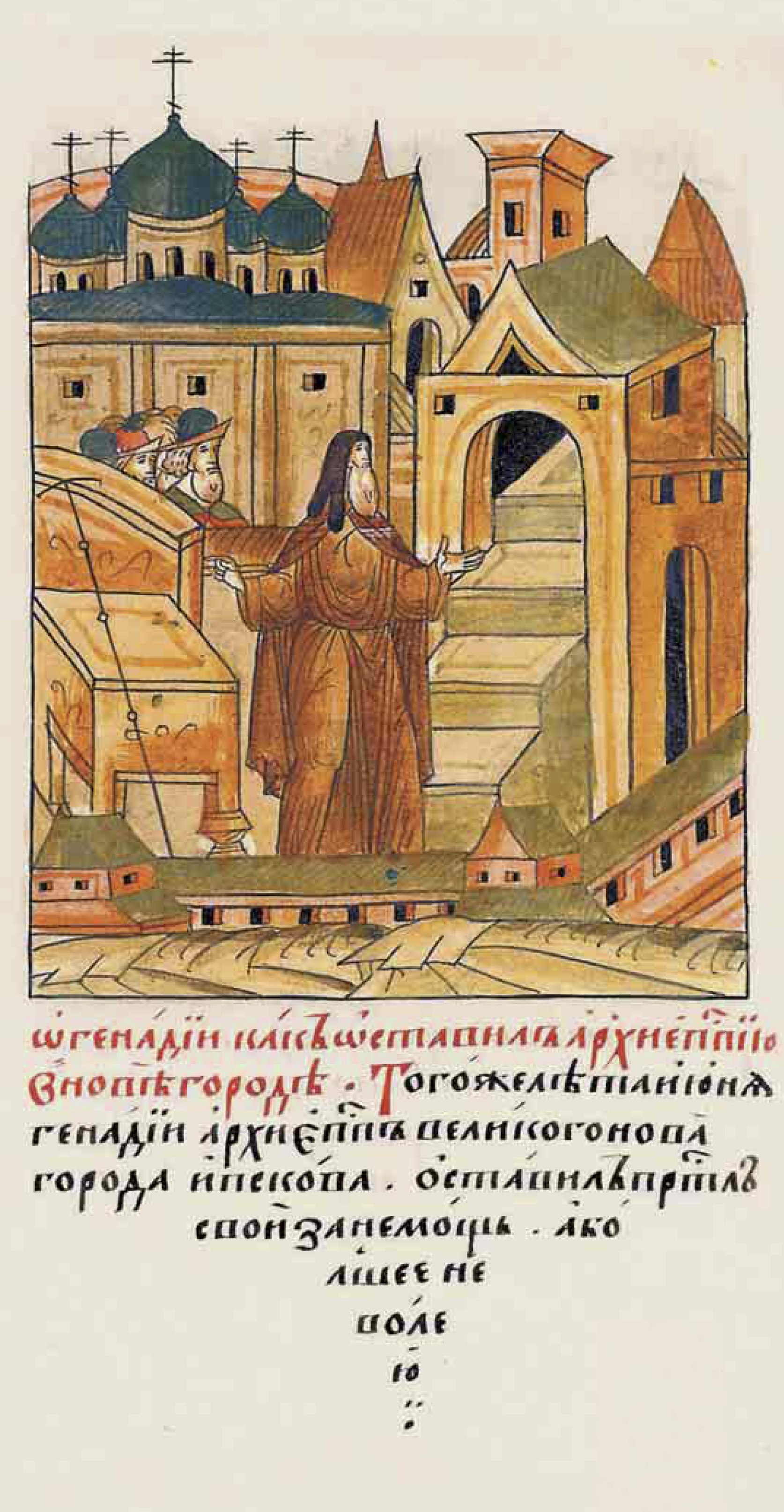 О Геннадии, как оста- вил архиепископию в Новгороде. В том же году в июне Геннадий, архиепископ Великого Новгорода и Пскова, оставил свой престол по своей немощи, а еще больше — по- неволе